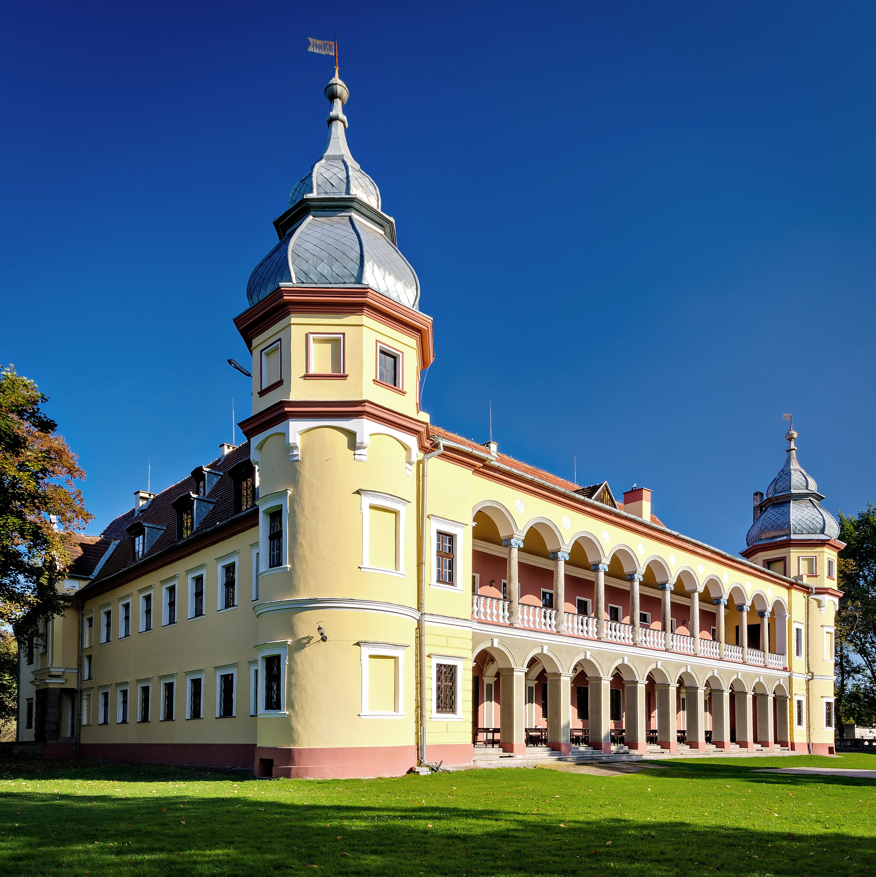 Krobielowice 21 - zamek, XVII, XIX